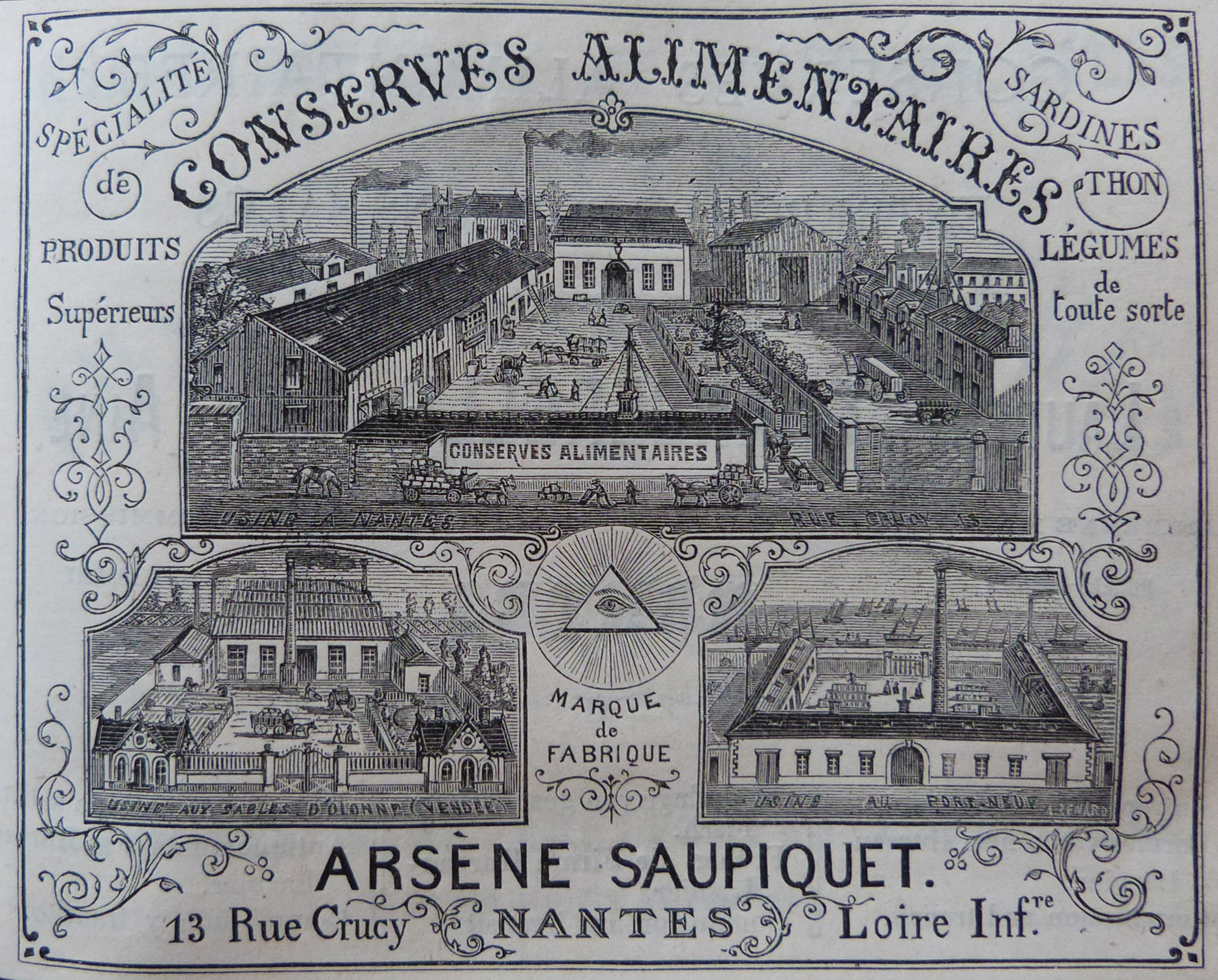 Publicité conserves alimentaires Arsène Saupiquet, sardines, thons, légumes, Nantes 13 rue de Crucy, 1882.